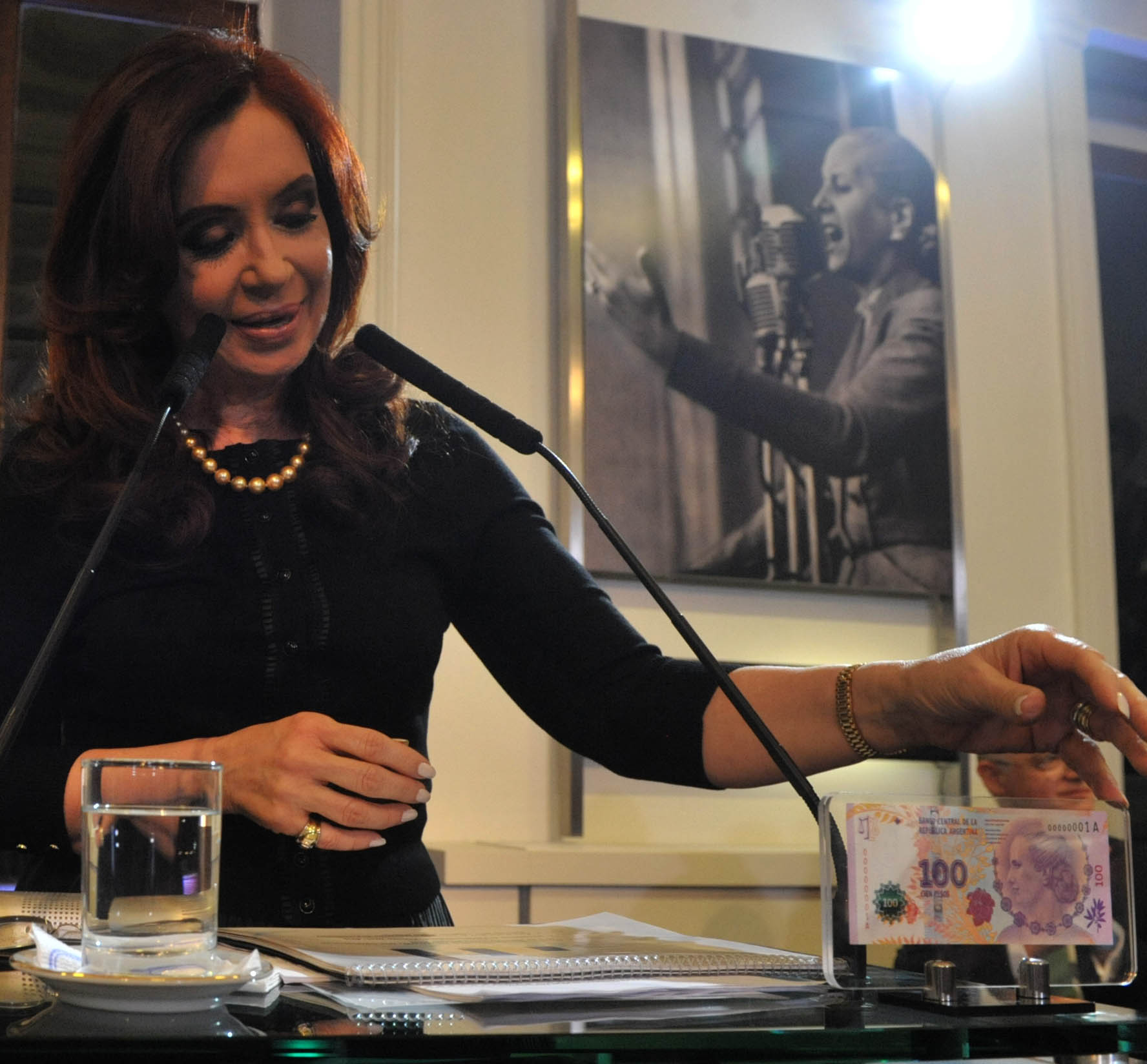 La presidenta Cristina Fernández presentó el billete conmemorativo del 60 aniversario de la muerte de María Eva Duarte de Perón. Pidió a las autoridades monetarias que arbitren las medidas para que pase a ser el billete de 100 pesos definitivo.